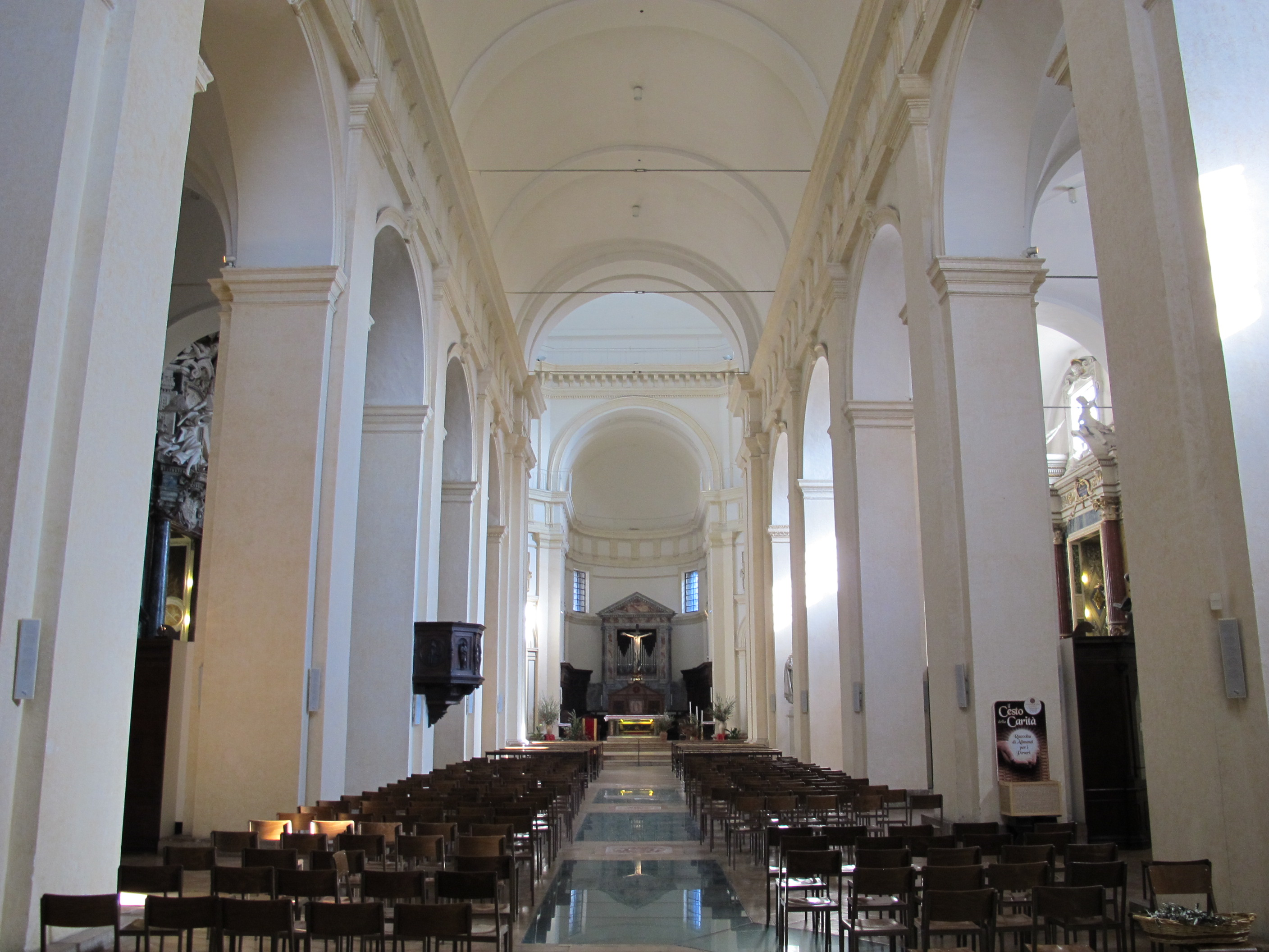 Asisi, san rufino, interno